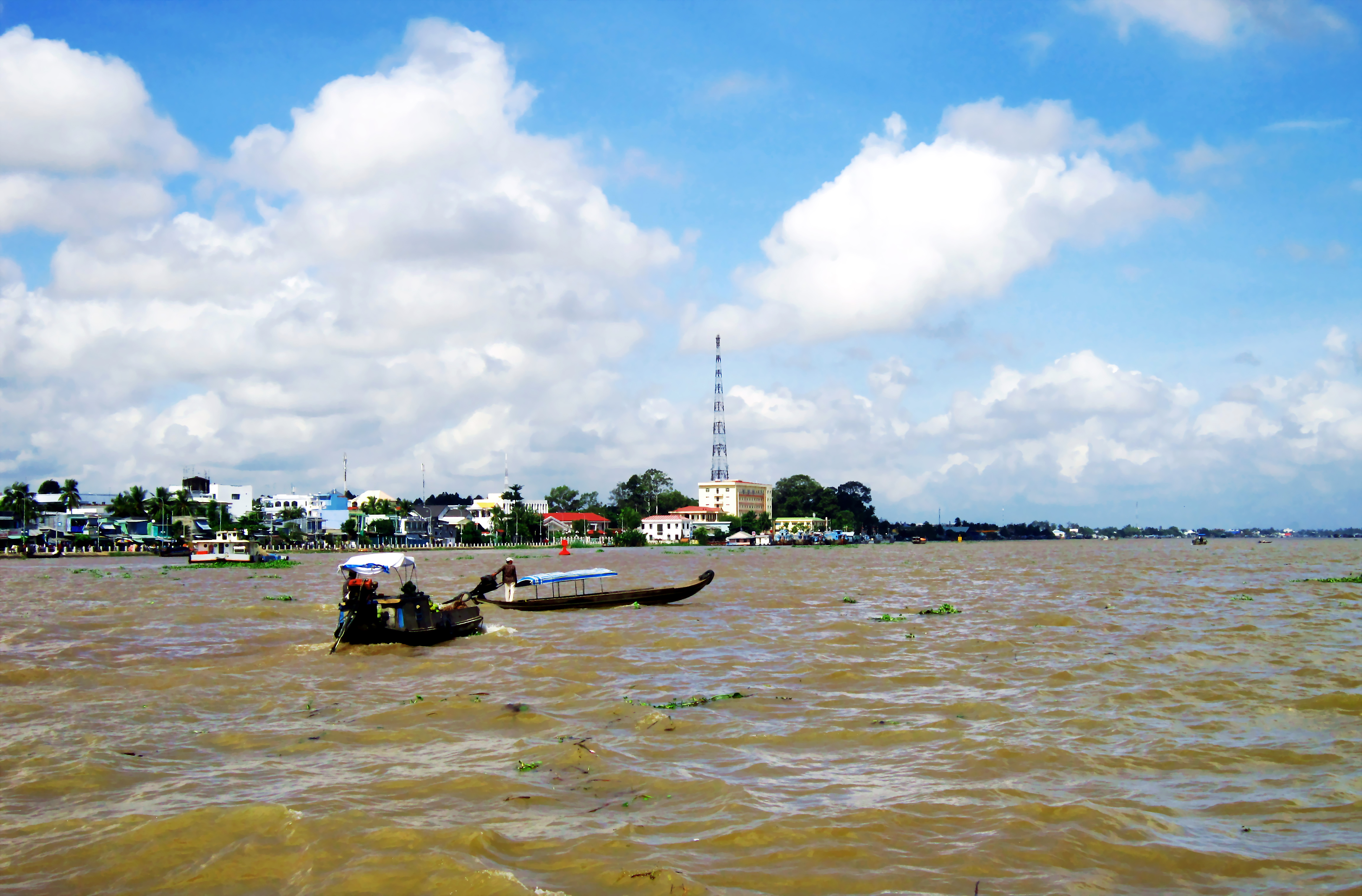 Sông Hậu, đoạn chảy qua thành phố Long Xuyên, An Giang, Việt Nam.